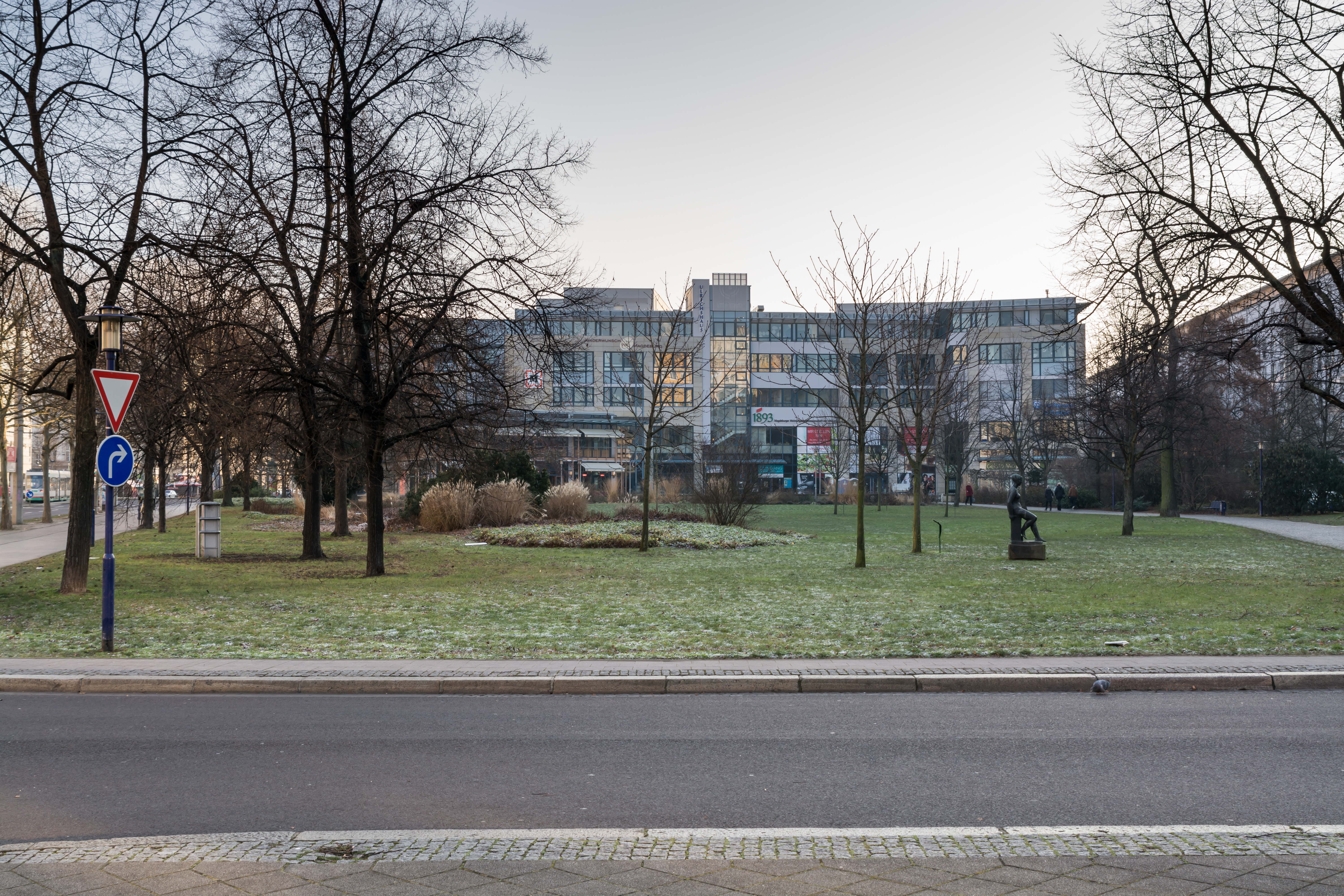 Ulrichplatz in Magdeburg-Altstadt. This is a photograph of an architectural monument.It is on the list of cultural monuments of Magdeburg